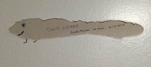 Math o graffiti ar y pryd sy’n manteisio’n greadigol ar ffurfiau ar hap